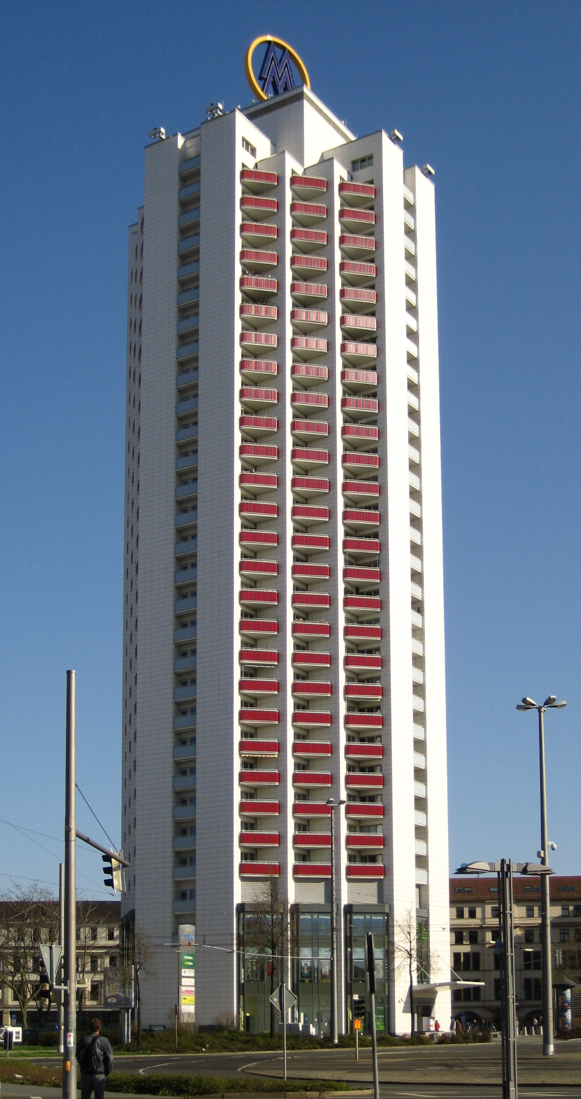 Wintergartenhochhaus, Leipzig, vom Hauptbahnhof aus gesehen